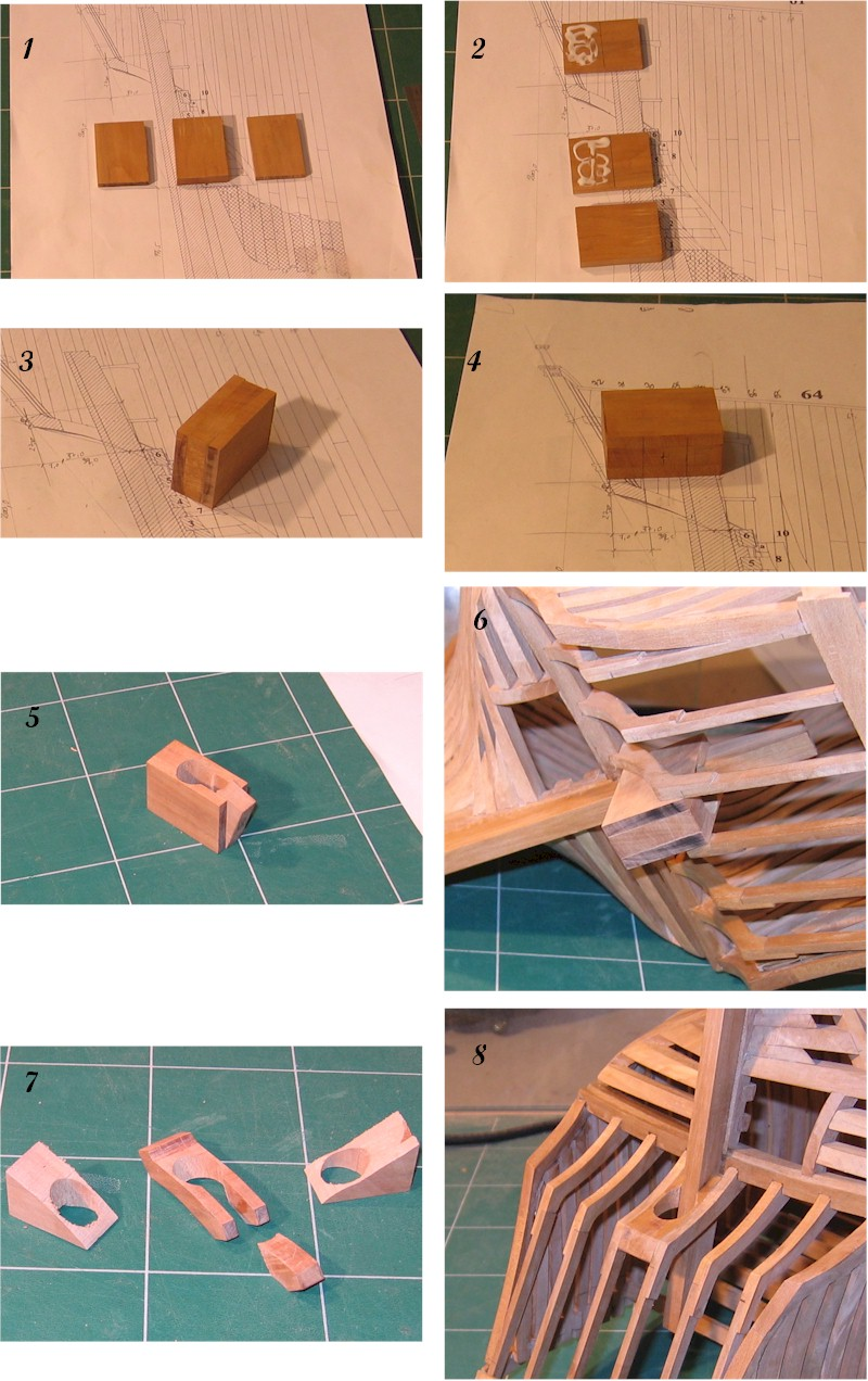 Exemple de truc de montage - passage de gouvernail